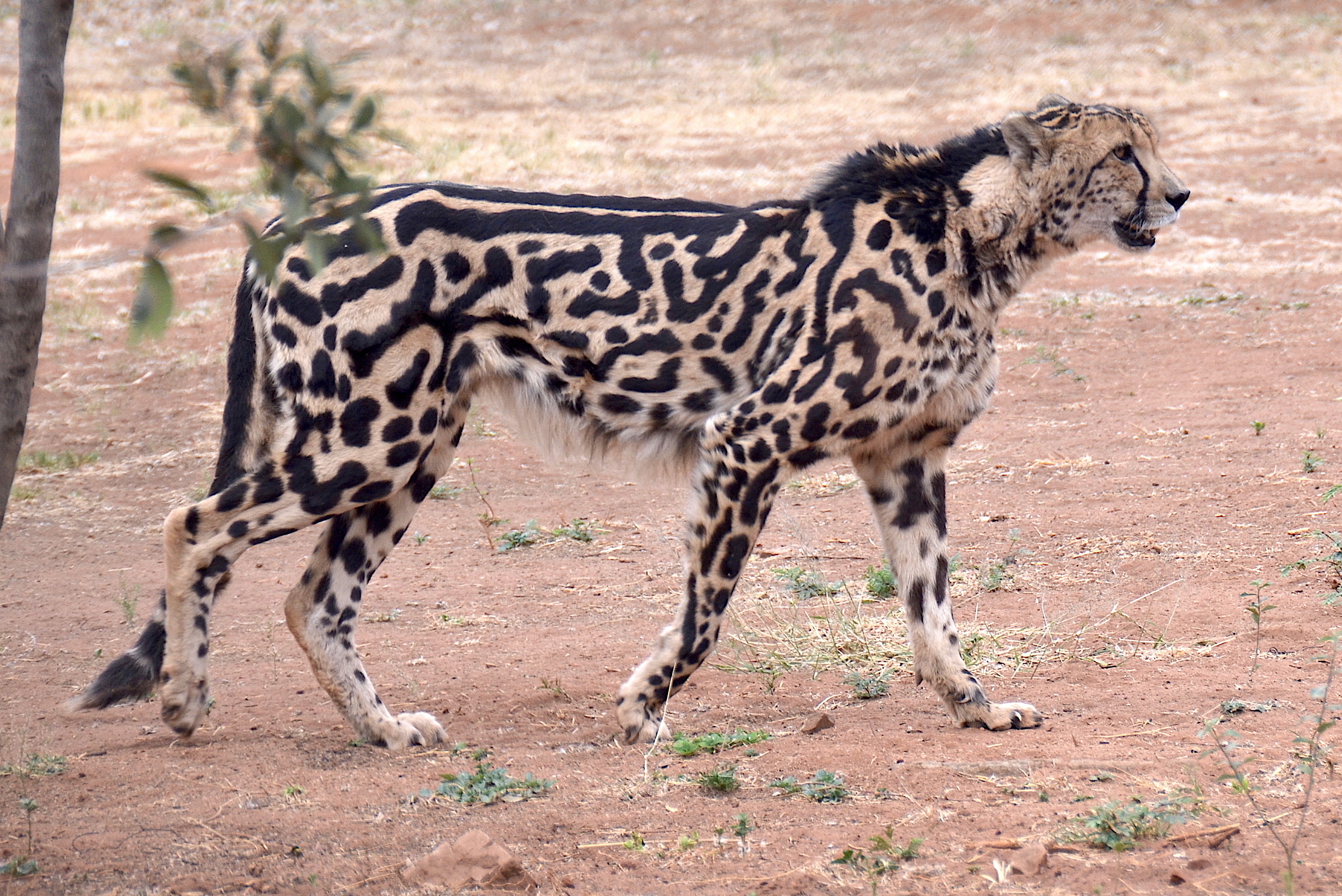 Königsgepard im De Wildt Cheetah Research Centre (Südafrika)